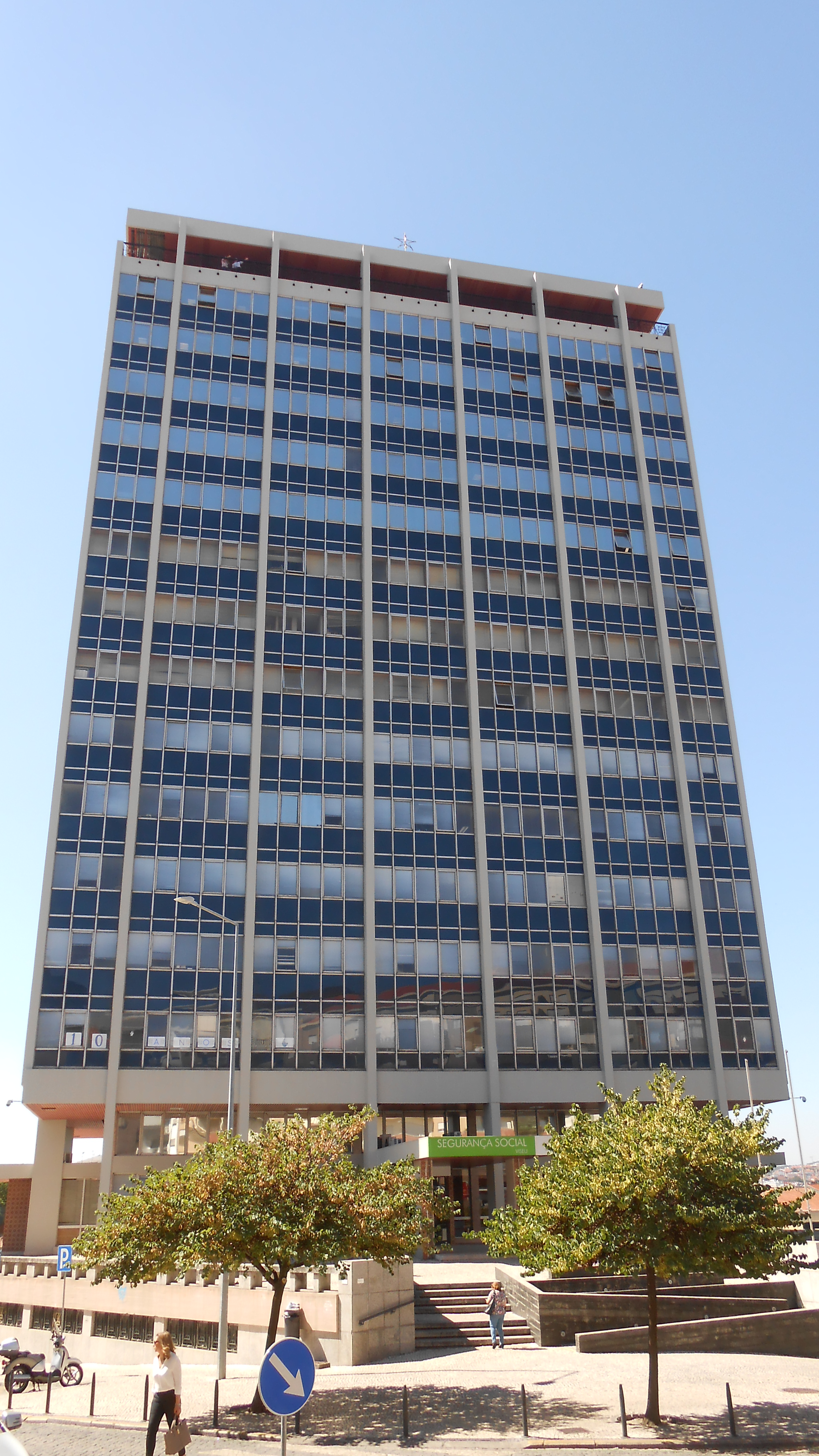 Edifício da Segurança Social em Viseu.